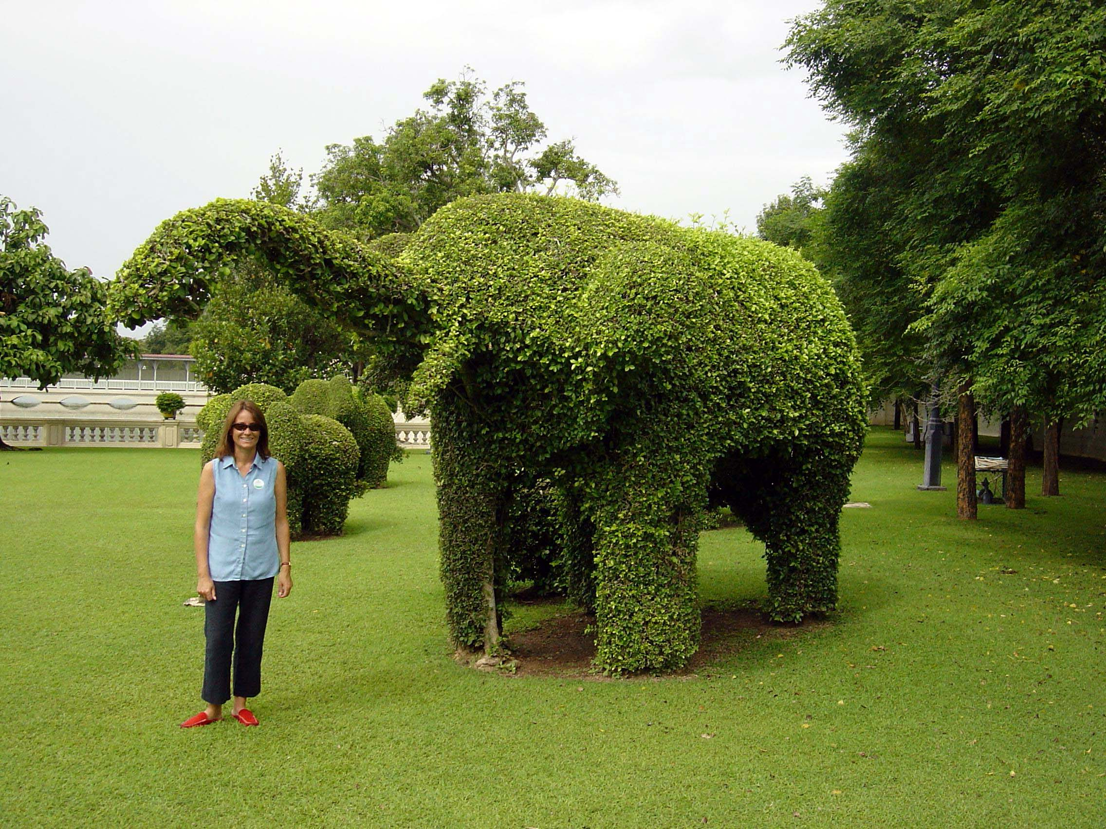 Topiary in Ayutthaya, Thailand